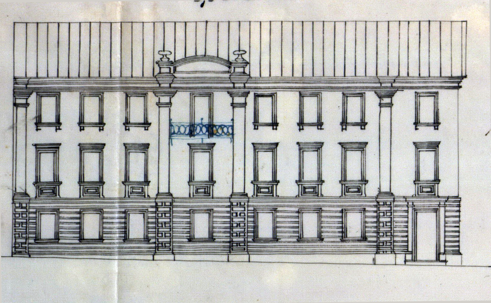 Беларуская (тарашкевіца): Менск (Miensk), вуліца Койданаўская (vulica Kojdanaŭskaja). Камяніца